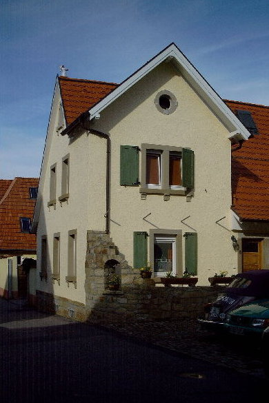 Geburtshaus von Leonhard Schanzenbach 2007